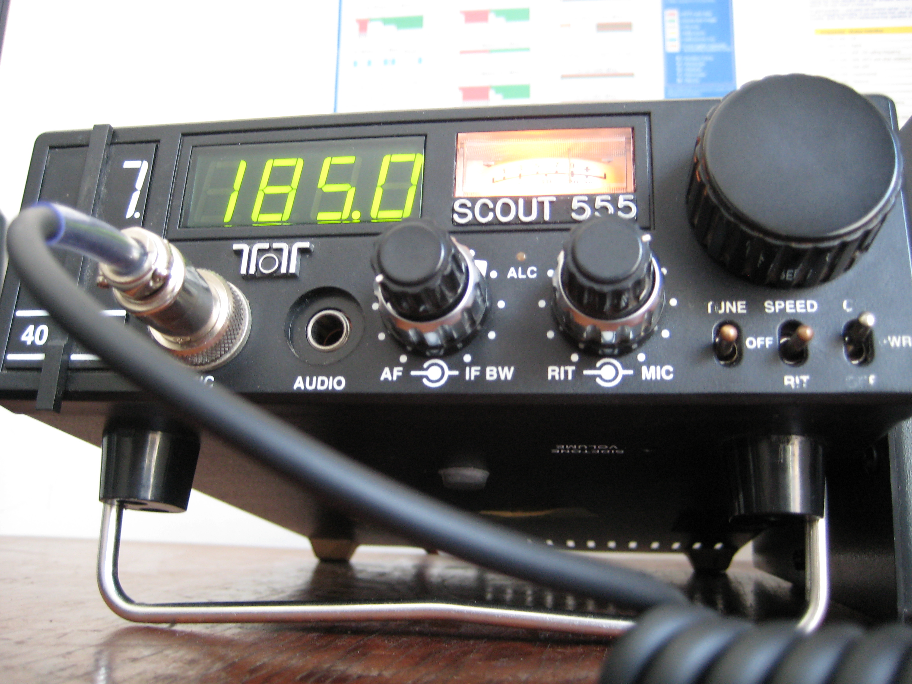 TenTec Scout. Rádio Amador.